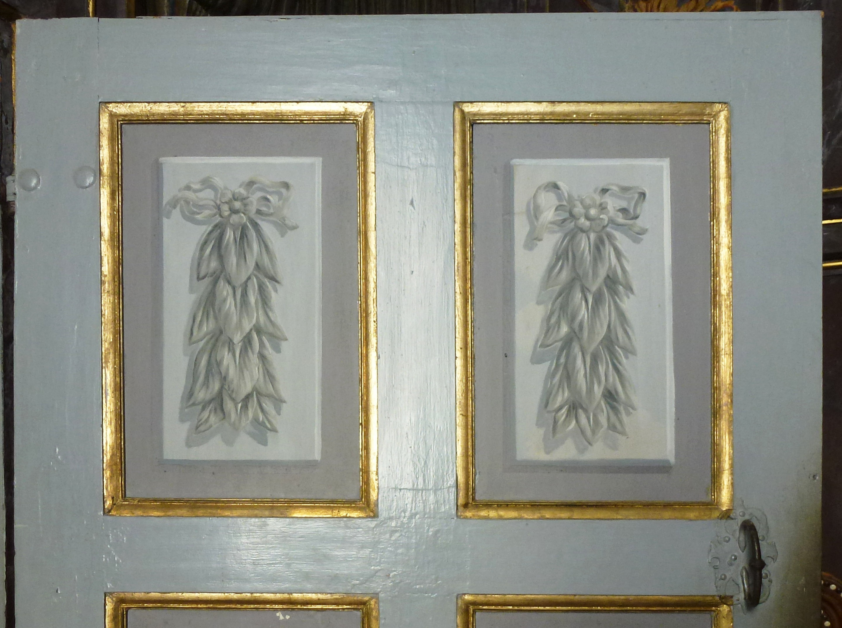 Skokloster innerdörr, detalj